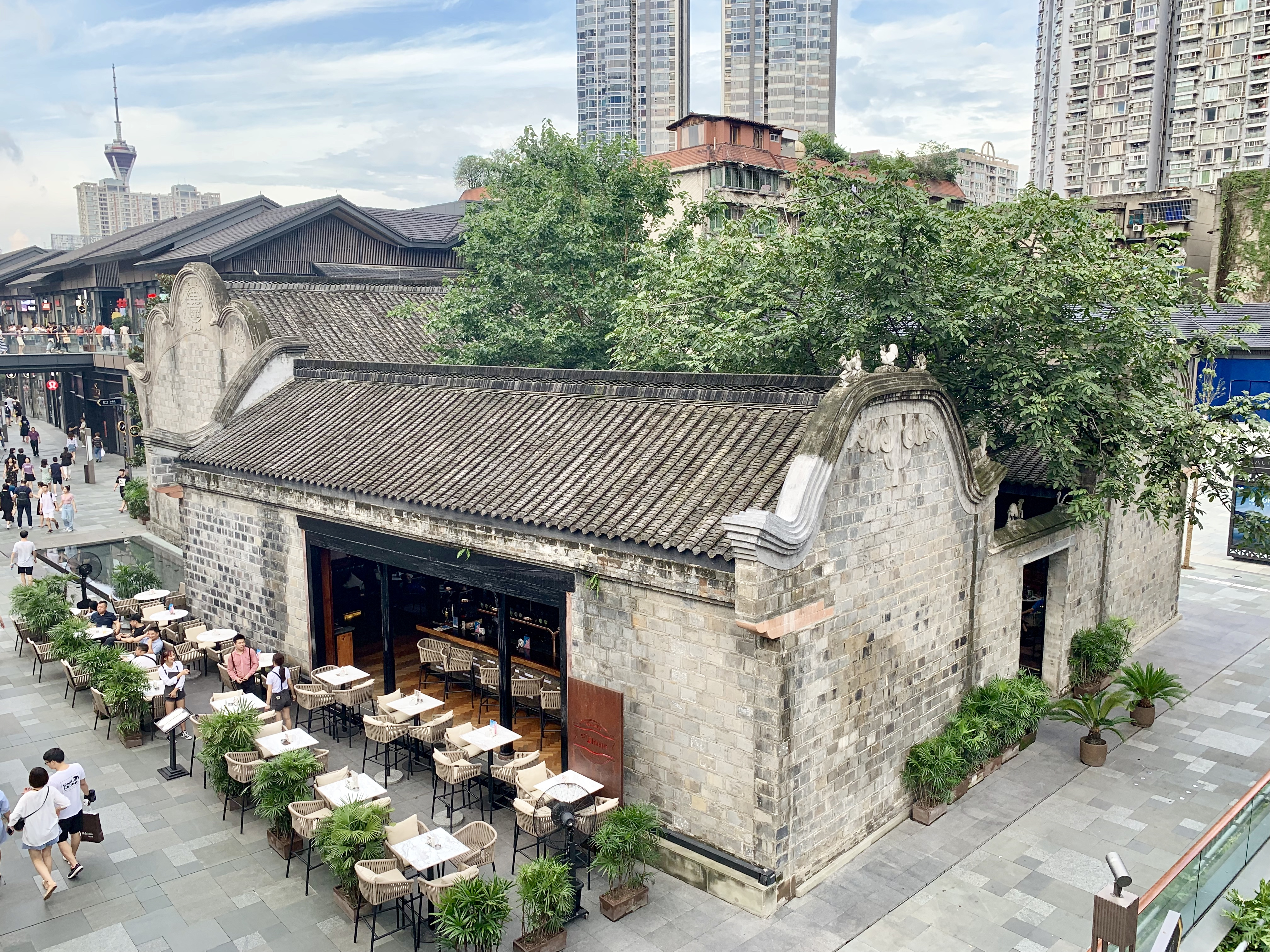 成都远洋太古里内笔帖式街15号庭院